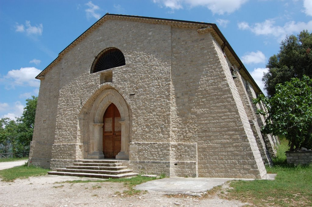 Montagano - Santa Maria di Faifoli